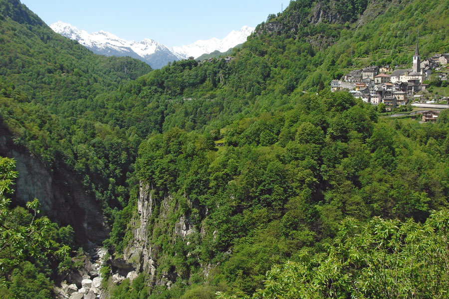 Il tratto iniziale della Valle Anzasca all'altezza dell'abitato di Castiglione